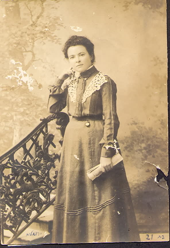 Yehudit Harari (1885-1979), Palestine - Eretz Israel, 1906.